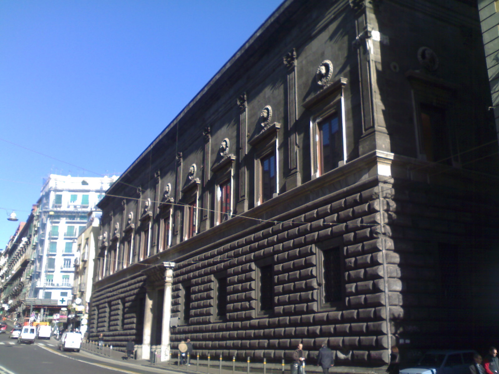 Facciata, Palazzo Gravina